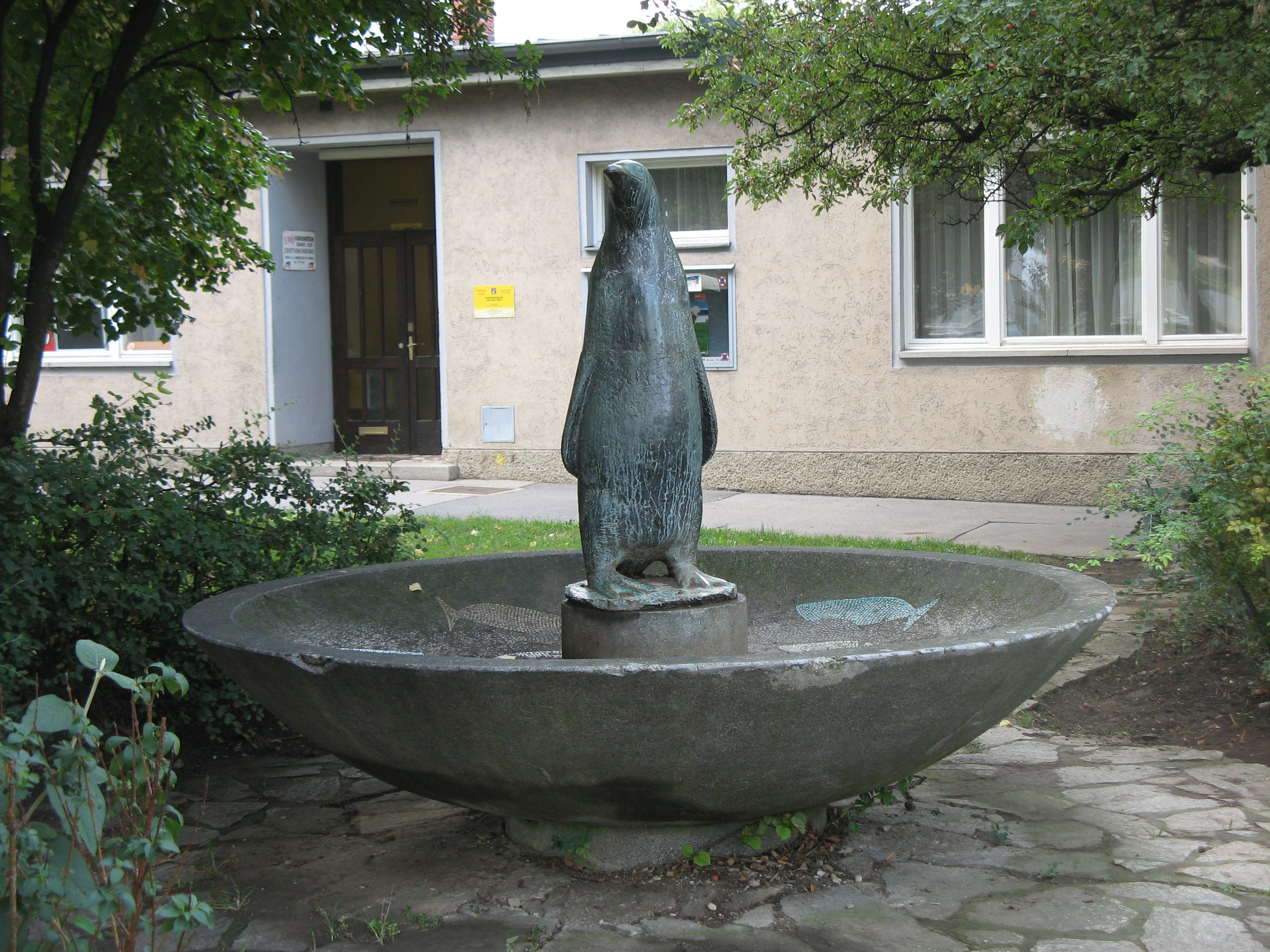 Pinguinbrunnen (1962) von Walter Leitner, Gußriegelstraße 52, Wien-Favoriten